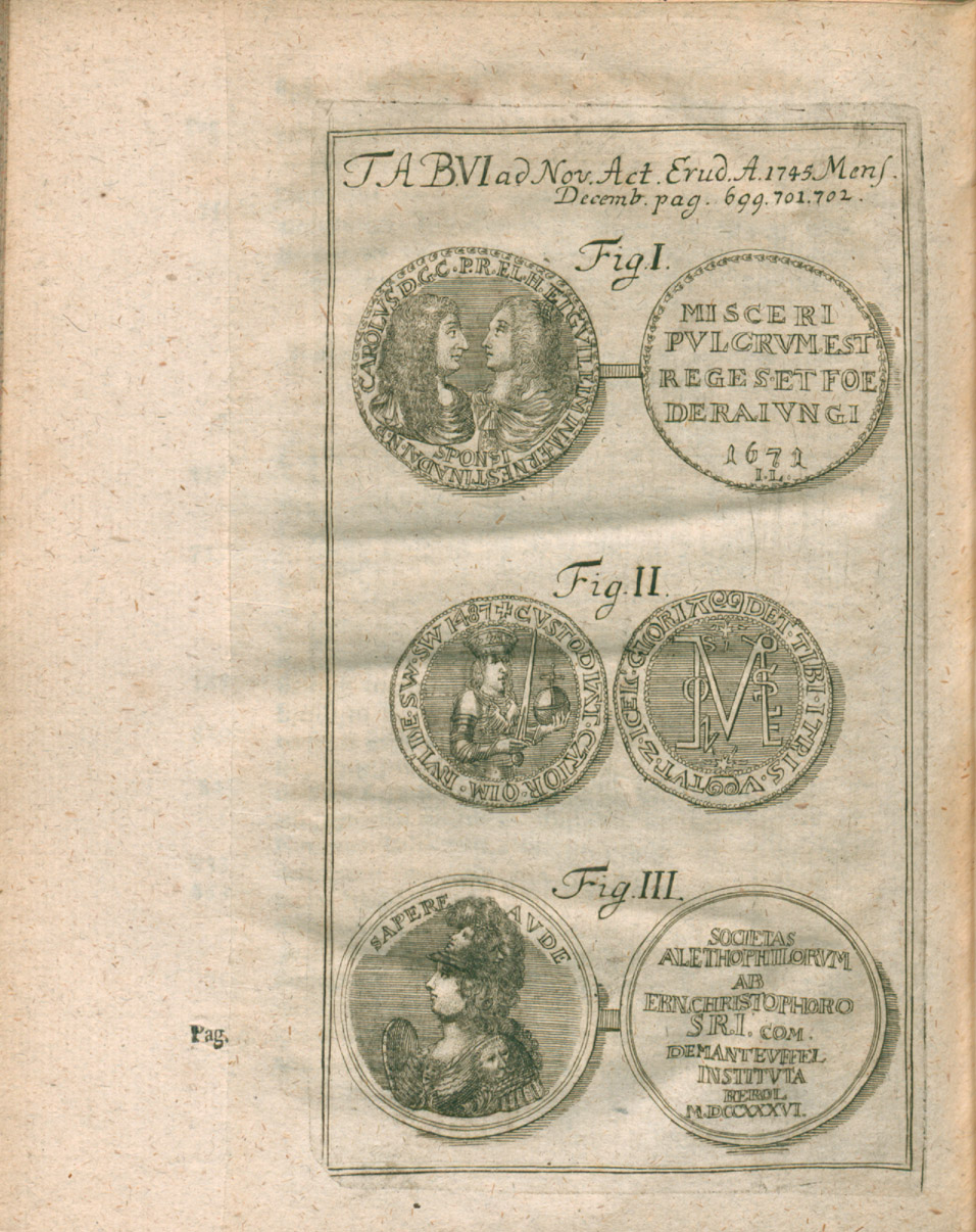 Illustration